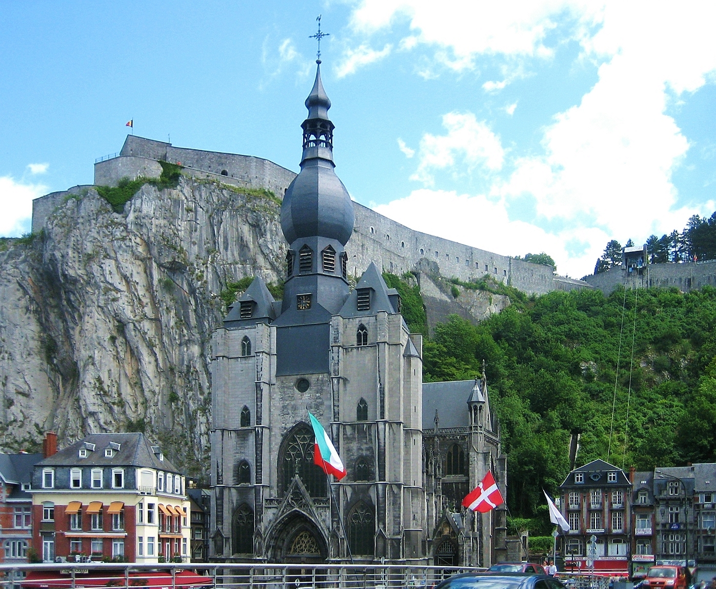 Vue op d'Kathedral an d'Zitadell (uewen) vun Dinant. 17. Juni 2007.